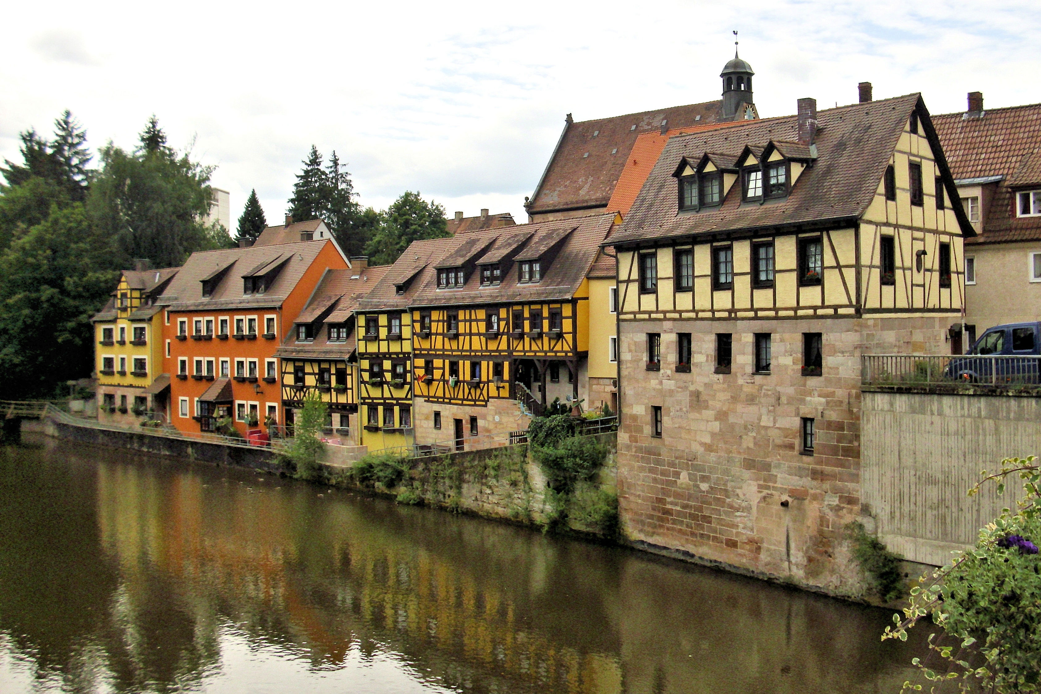 Denkmalgeschützte Häuser im Bereich der Unteren und Oberen Wassergasse mit Erdgeschoss aus Sandsteinquadern und Fachwerkobergeschoss am linken Rednitzufer südlich der Brücke der B14